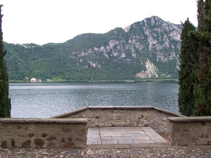 Lago di Lugano e Monte San Salvatore visti da Campione d'Italia